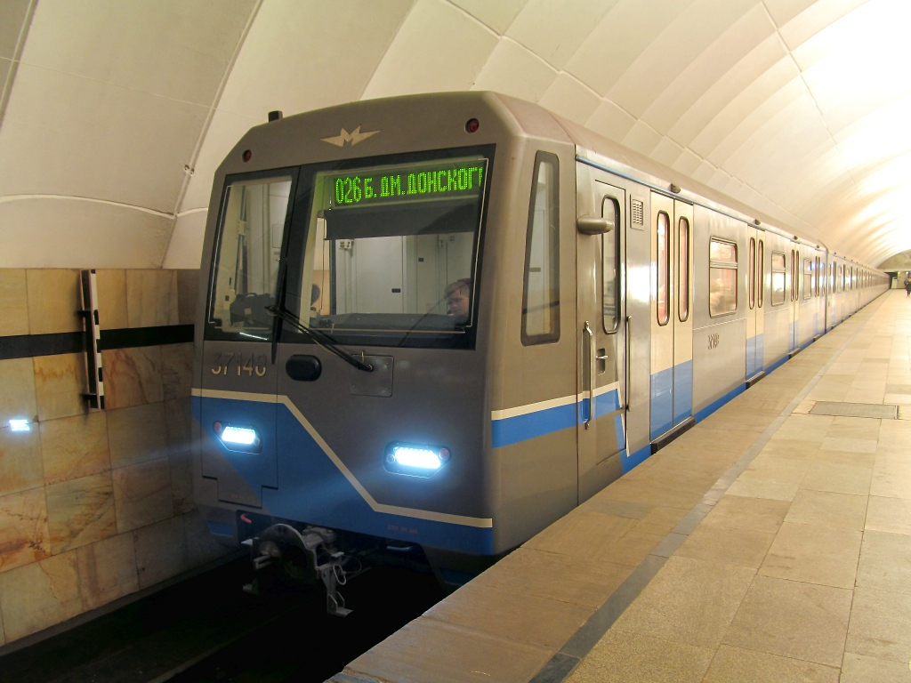 Состав из вагонов 81-760/761 на ст. "Тимирязевская"